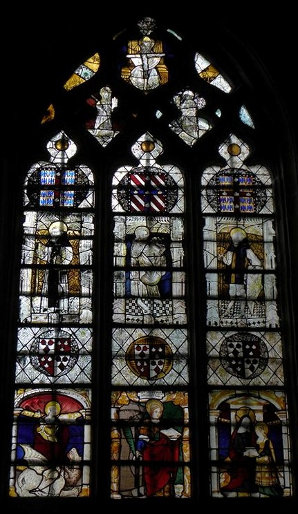 Baie 5 de l'église Saint-Ouen des Iffs (35).